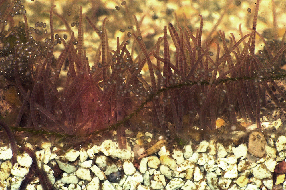 Tubifex, verankert im Bodengrund